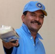 यह मदन लाल जी की तस्वीर है।